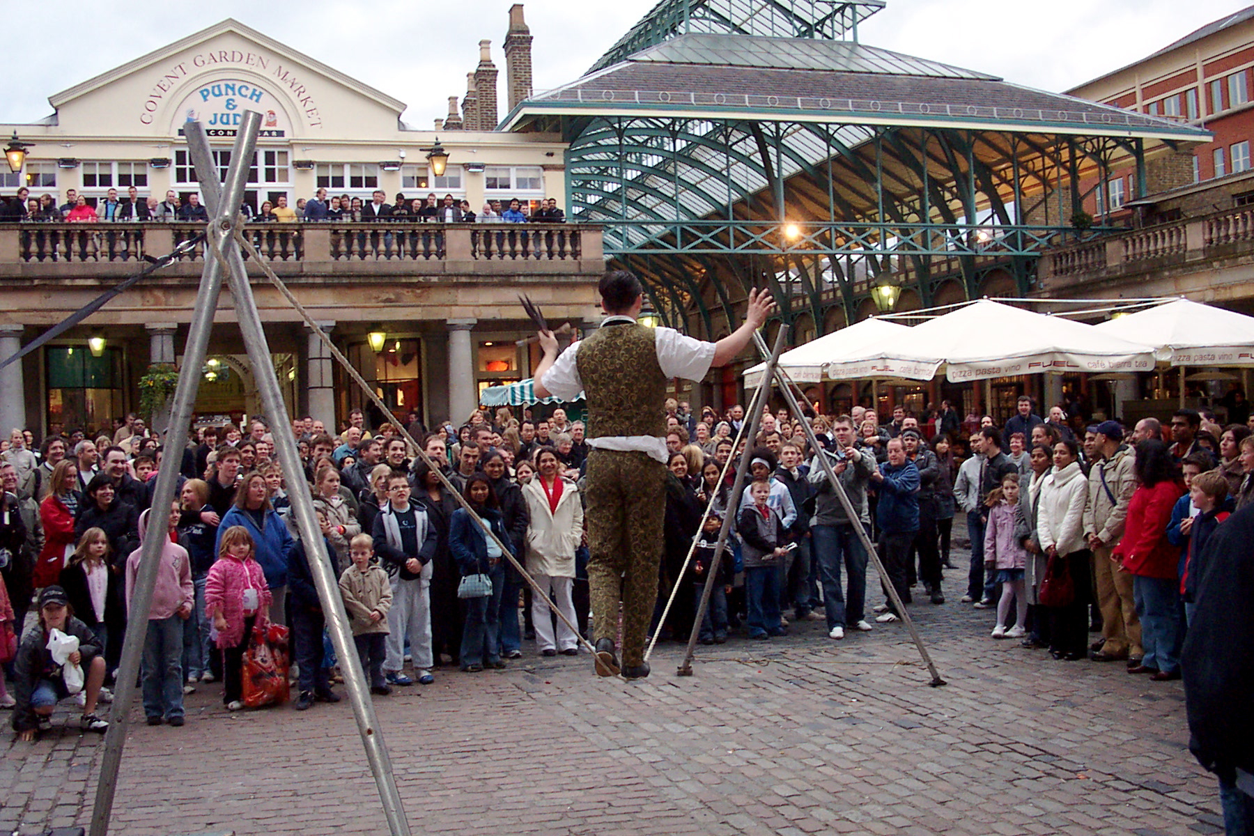 Covent Garden